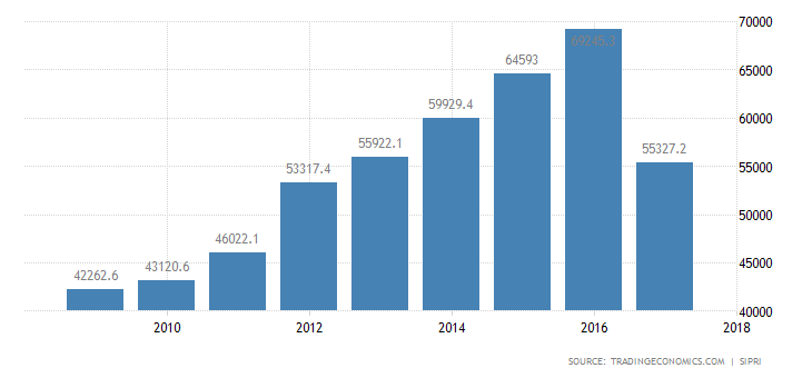 Budget governativo per le Forze Armate della Federazione Russa dal 2008 al 2017.